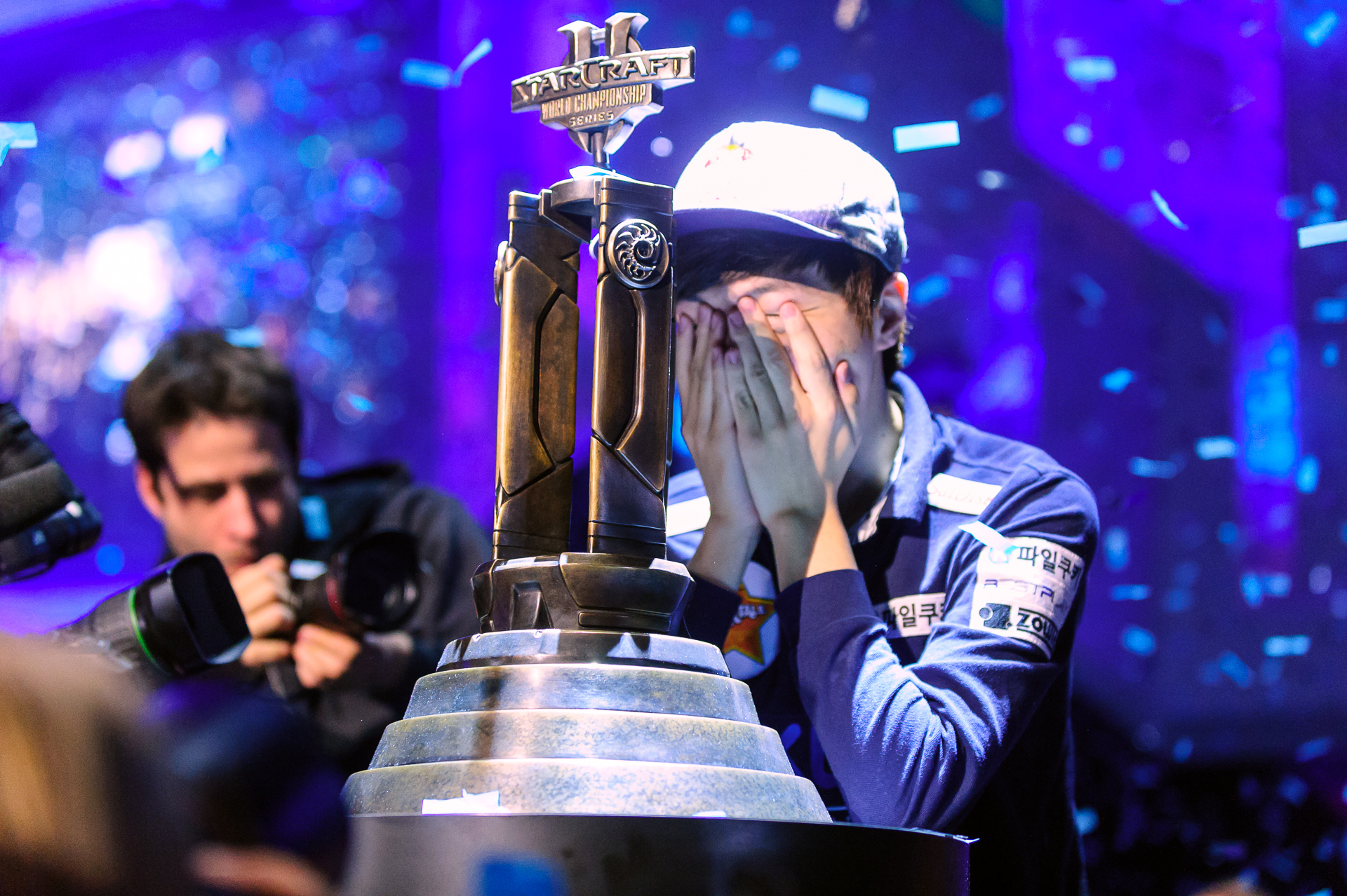 Life reçoit son trophée aux 2014 Global Finals